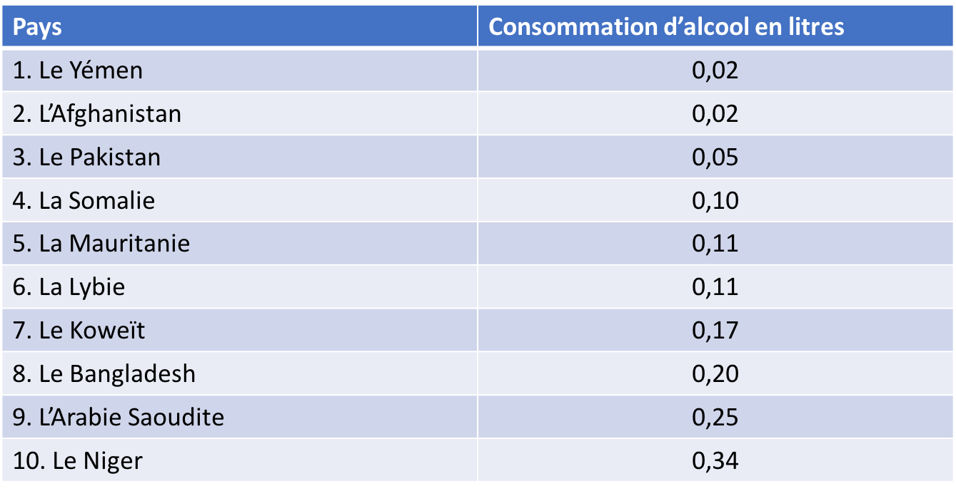 consommation les plus faible d'alcool